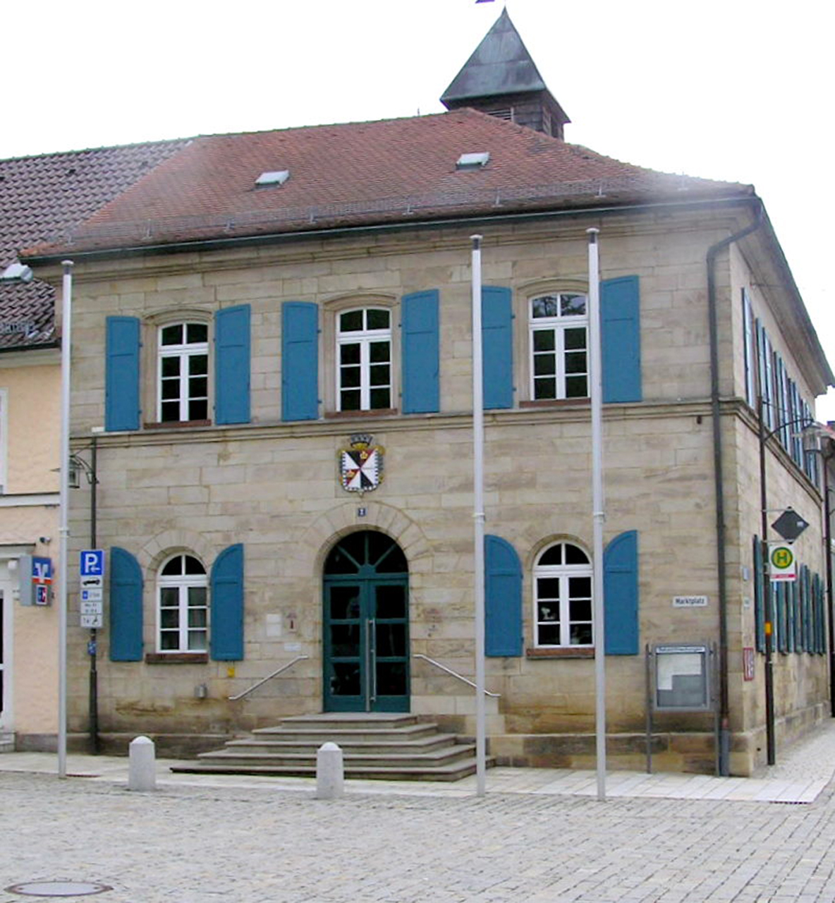 Rathaus Goldkronach